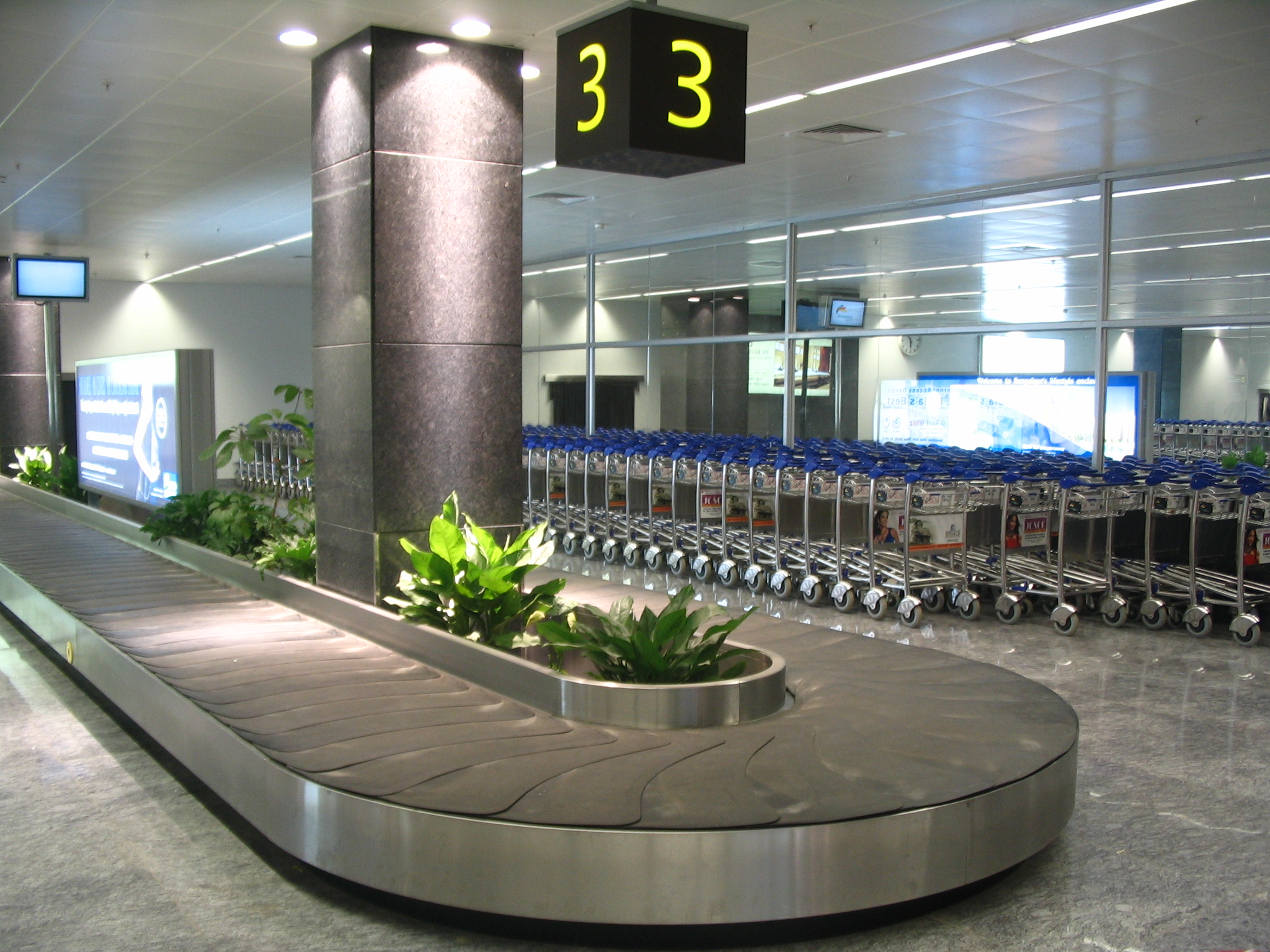 Luggage belt 3 at Bengaluru International Airport.